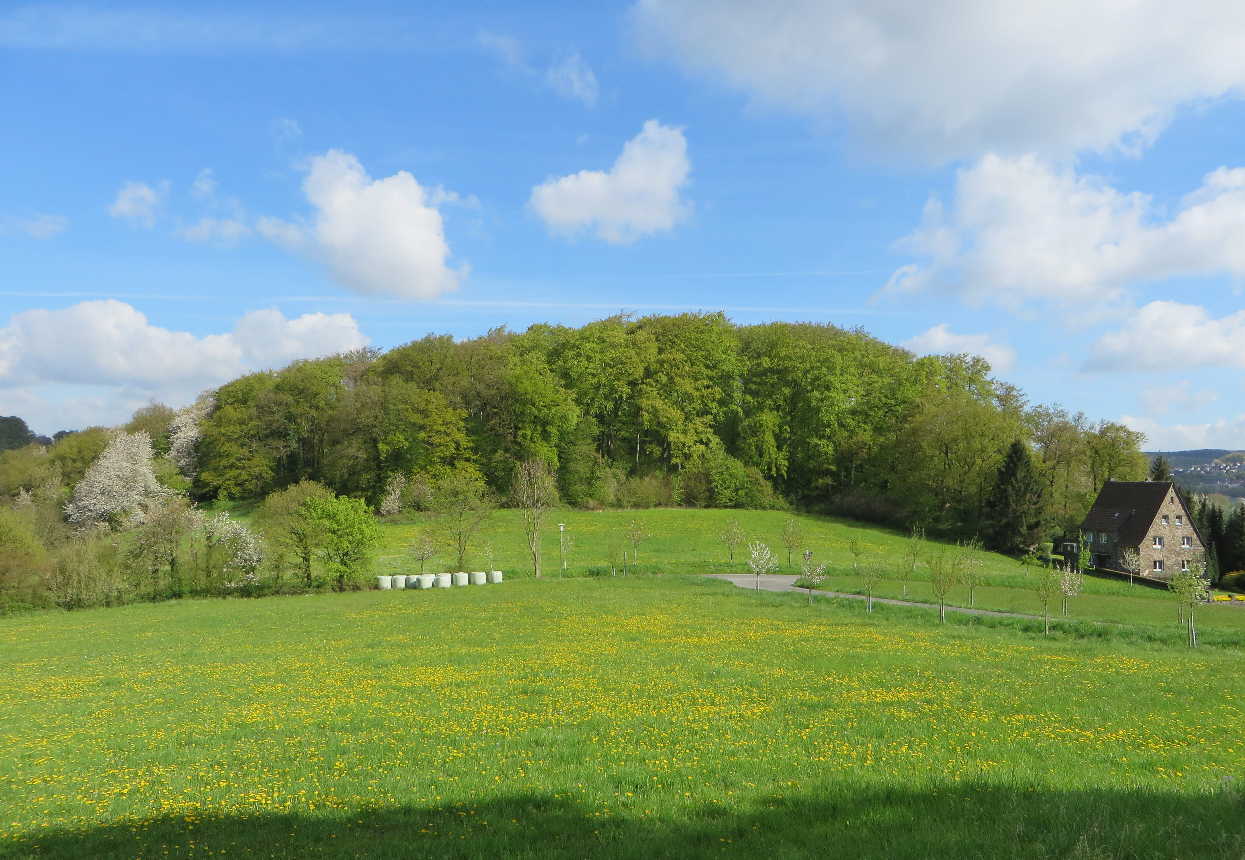 Blick vom Piepenbrink über die Straße „Alte Stadt“ in Hagen-Hohenlimburg auf das Naturschutzgebiet Hünenpforte (HA-001) in Holthausen. Bei dem Schutzgebiet mit Felsklippen und Kalkfels-Formationen handelt es sich um einen Kalkbuchenhochwald (Orchideen- und Waldmeister-Buchen) mit ausgeprägter, botanisch wertvoller Strauch- und Krautschicht. Von der B 7 steigen die Kalkklippen des anstehenden Massenkalks steil auf, während er nach der Westseite, zur Holthauser Senke hin, allmählich abfällt. Der steinerne Bogen der Hünenpforte wird als letzter Rest einer eingestürzten Kalksteinhöhle gedeutet. Es befinden sich im Steilhang und im Inneren des Gebietes zahlreiche Höhlen mit Sinter- und Tropfsteinbildungen, die seit längerer Zeit trocken sind. Auf der Bergkuppe befinden sich Reste der mittelalterlichen Rücklenburg aus dem 13. Jahrhundert.